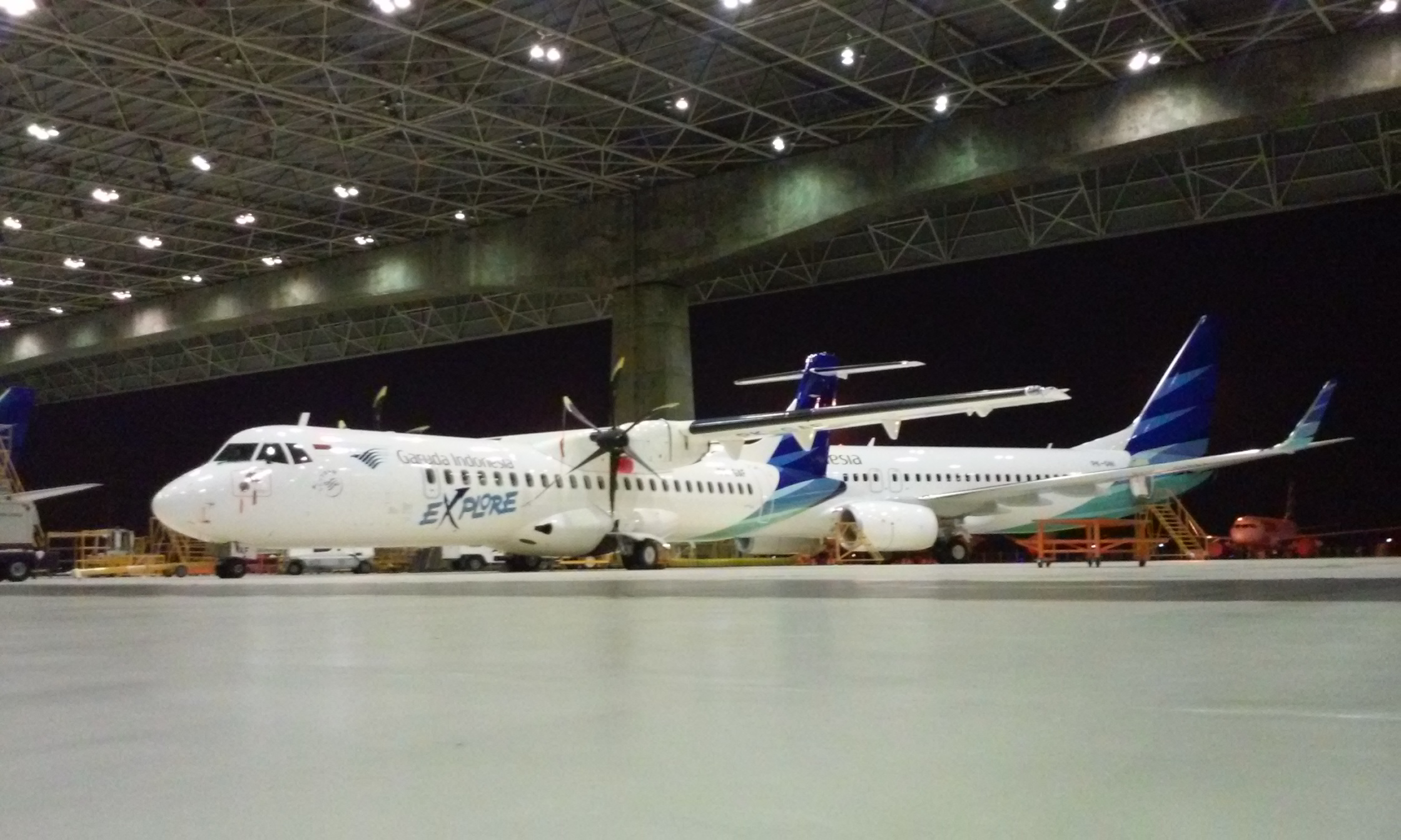 Garuda Indonesia ATR 72-600 in hanggar 2 GMF AeroAsia Soekarno-Hatta International Airport, with Garuda Indonesia Boeing 737-800 behind.